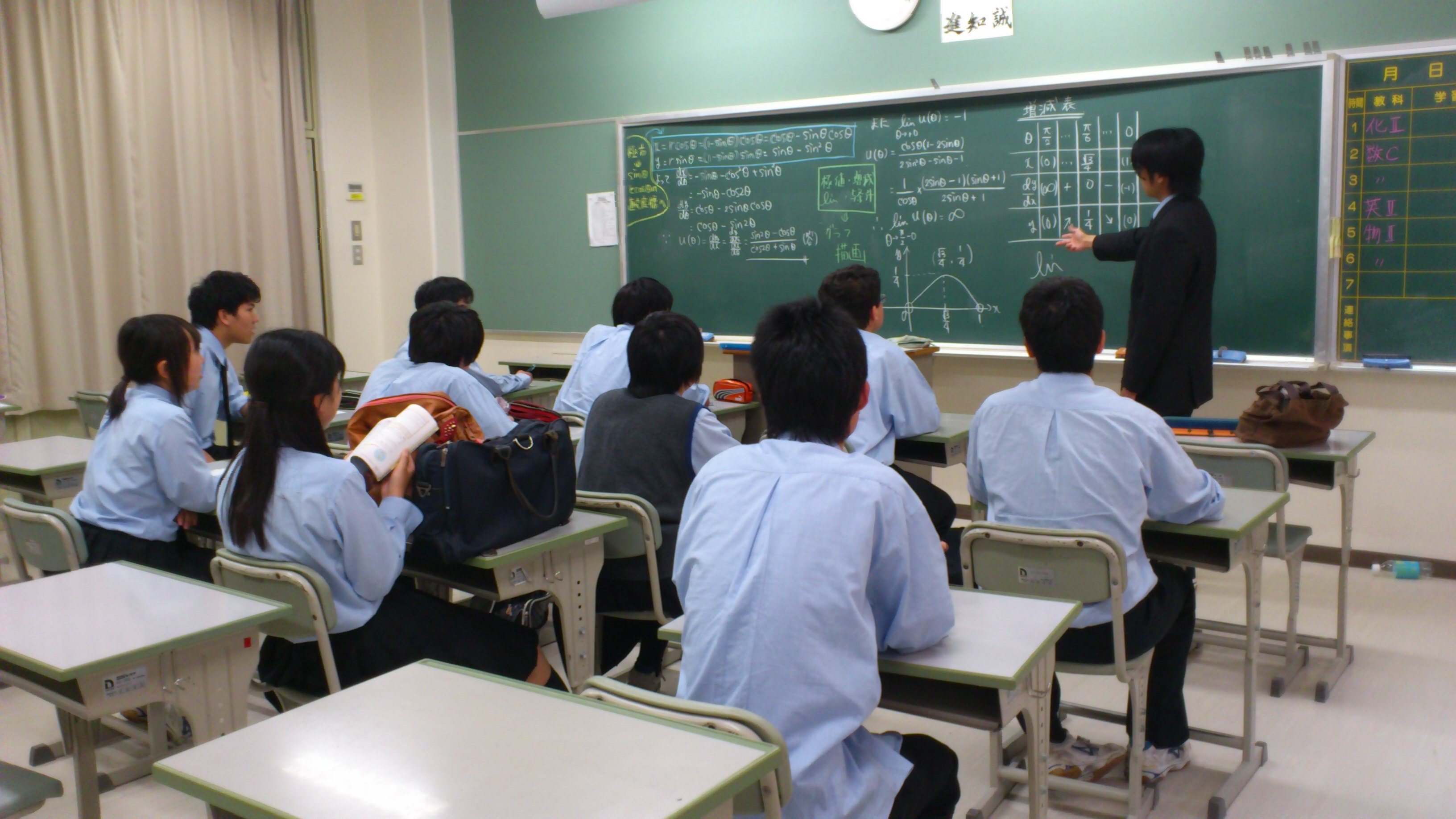 新田青雲における有志生徒による勉強会風景。